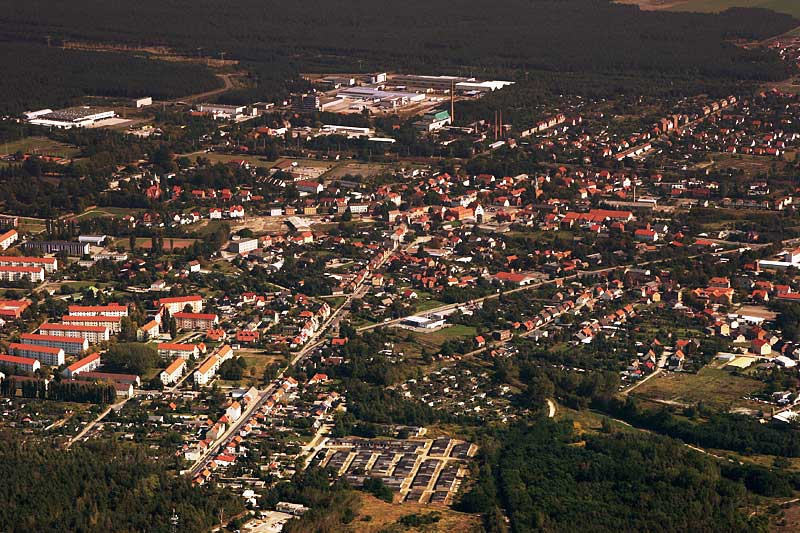 Die Stadt Großräschen am 24.09.2005 aus 600 m Höhe, Blick nach West